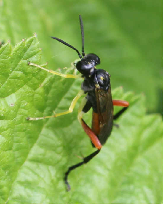 Macrophya rufipes, Männchen, am 2.6.2017 in Walldorf/Baden